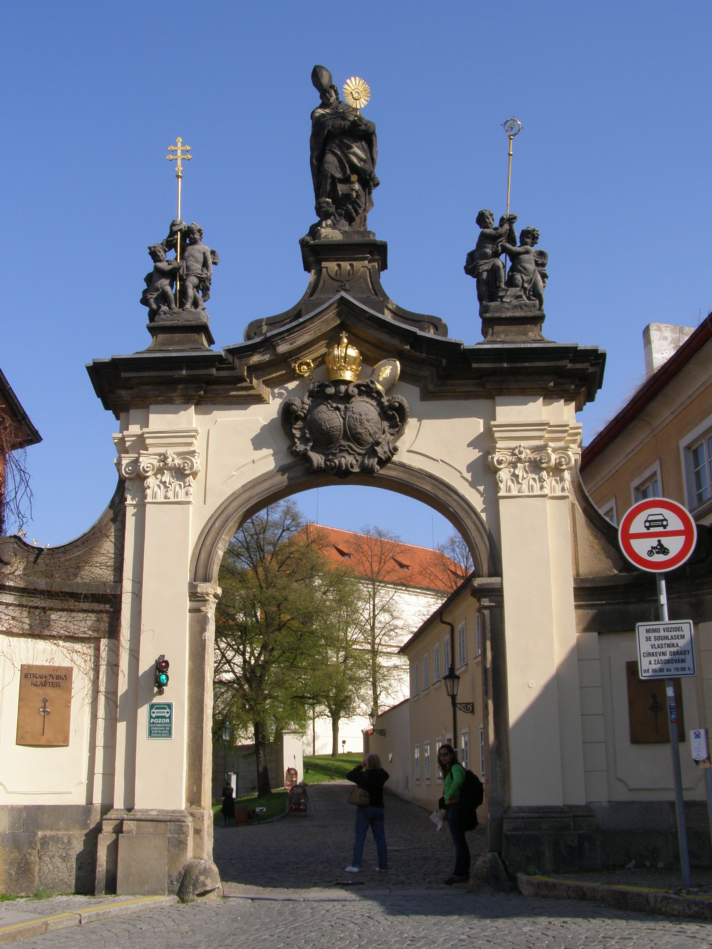 Praha, Strahovský klášter, vstupní brána, socha svatého Norberta